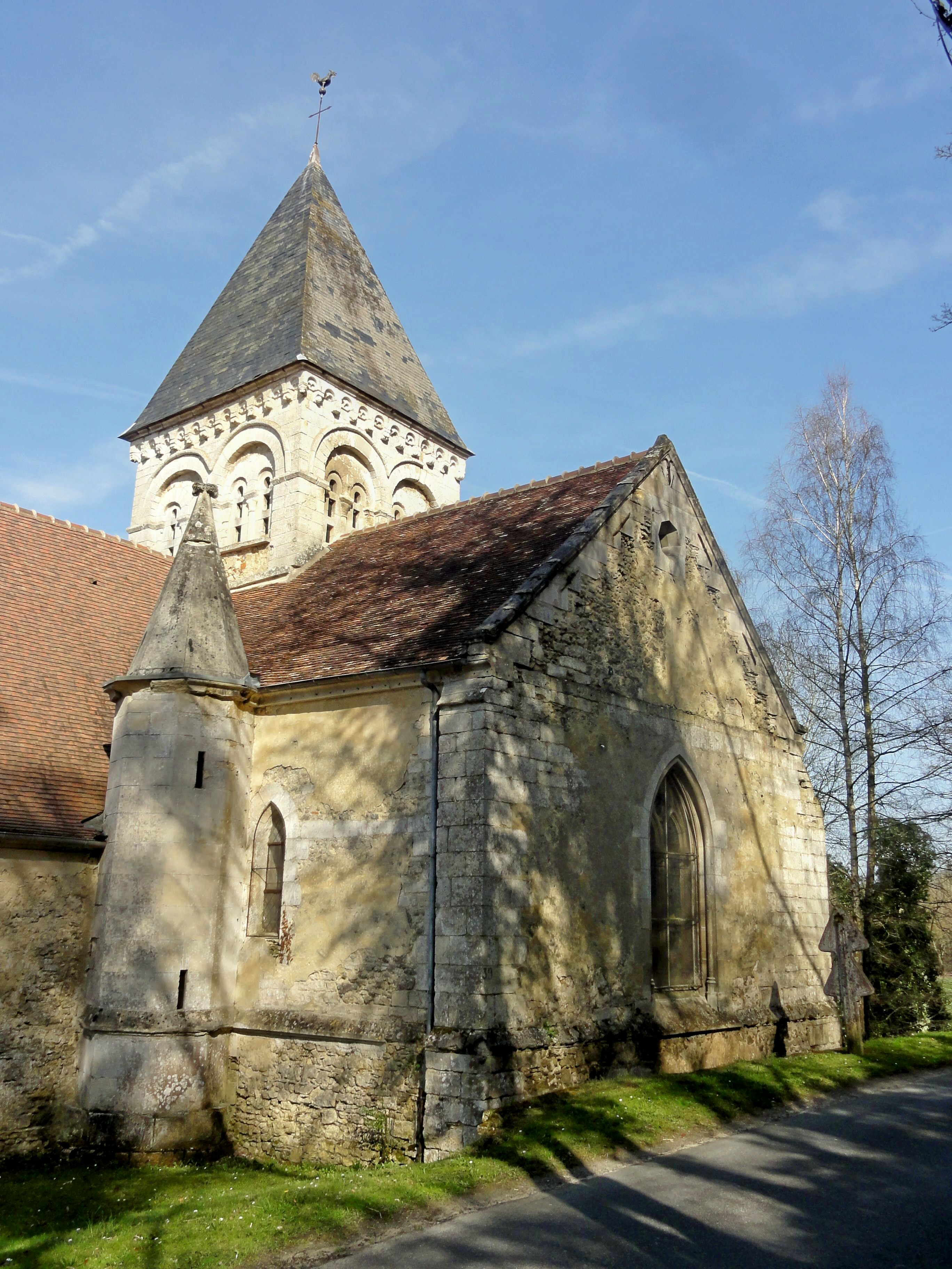 Le croisillon sud.